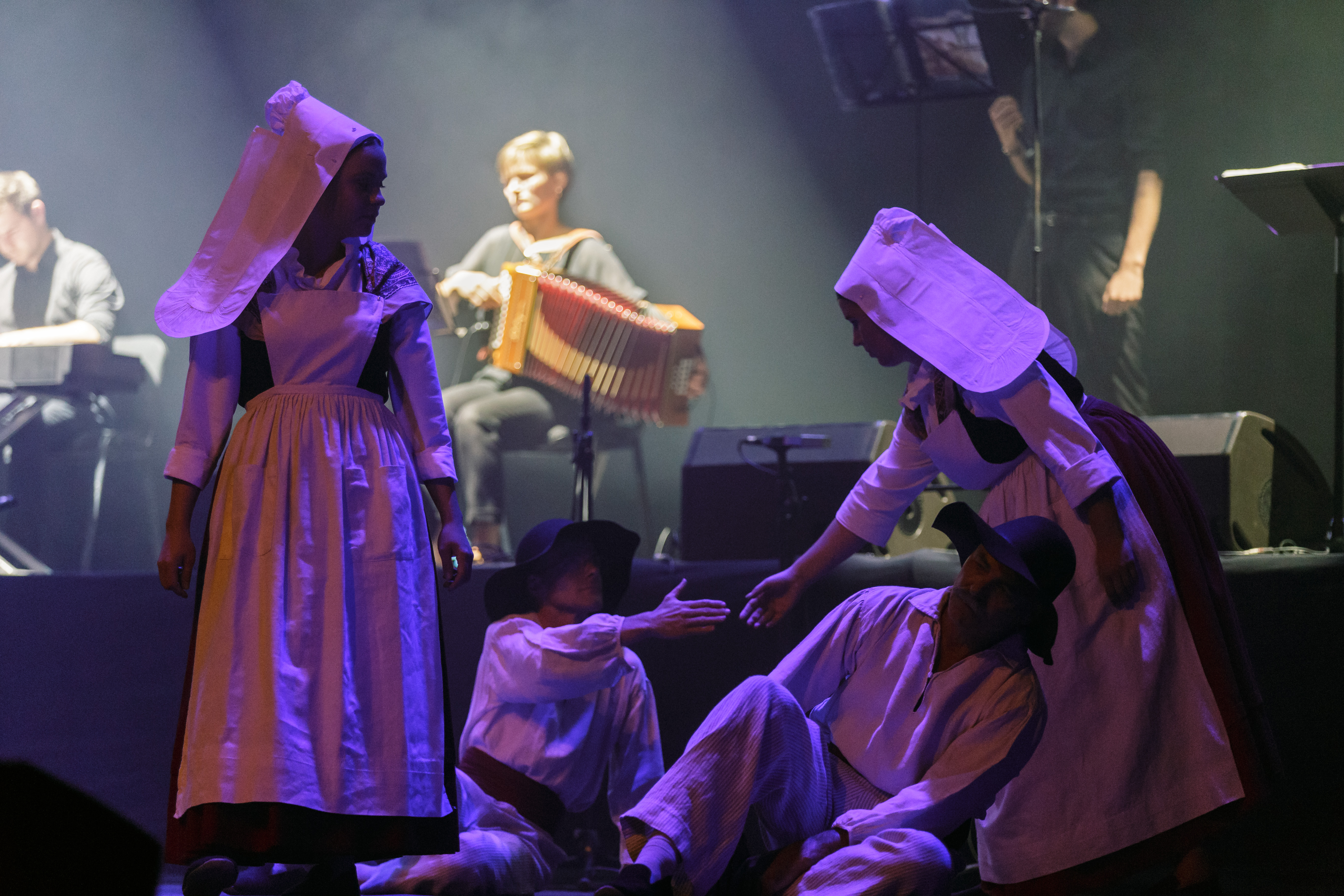 Le cercle Les Perrières de Cesson-Sévigné lors du spectacle Kement Tu, organisé par la confédération de danse War’l Leur dans le cadre du Championnat de Bretagne au Pavillon de Penvillers à Quimper le 22 juillet 2017.